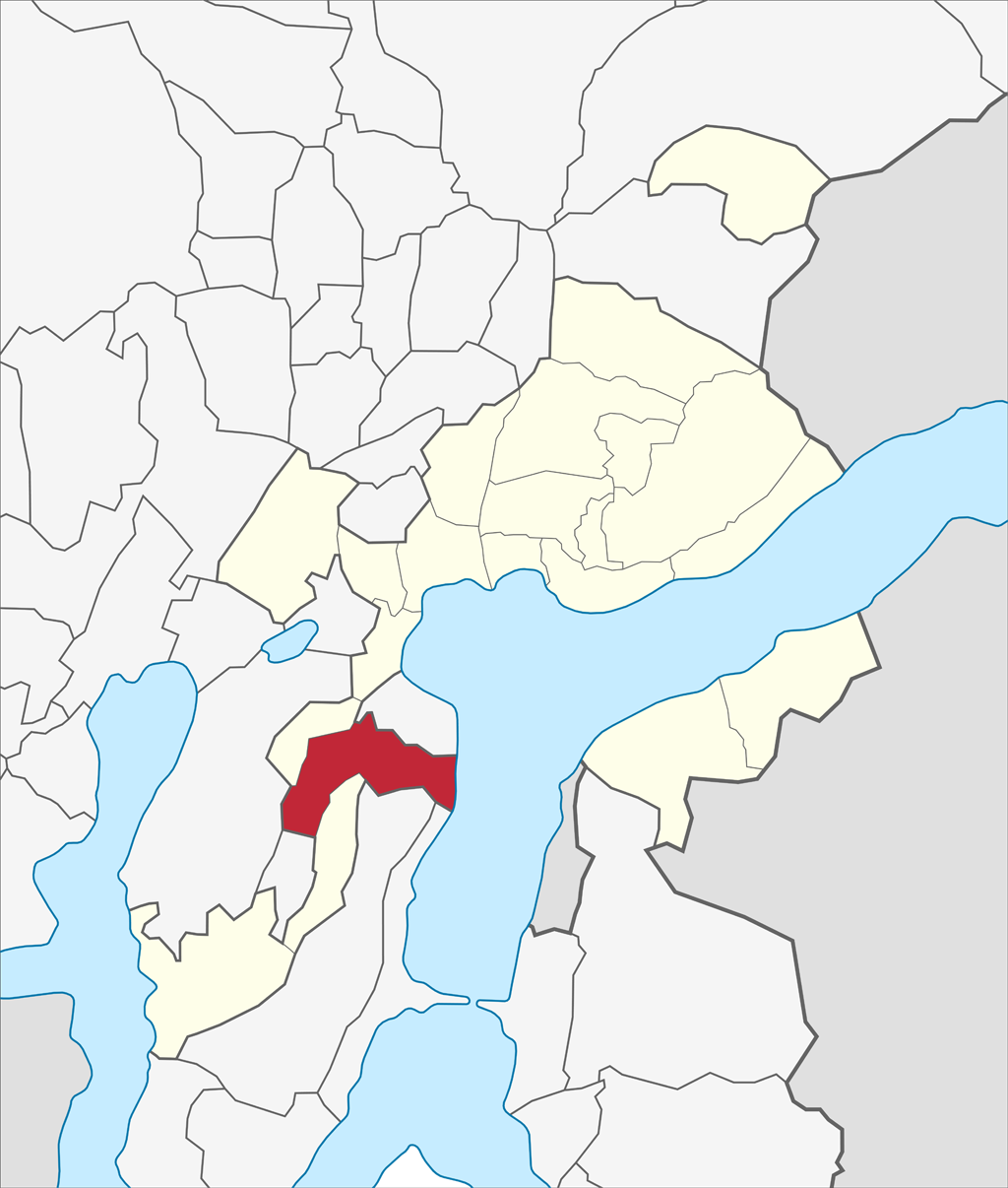 Localizzazione del quartiere di Pazzallo nel territorio comunale di Lugano